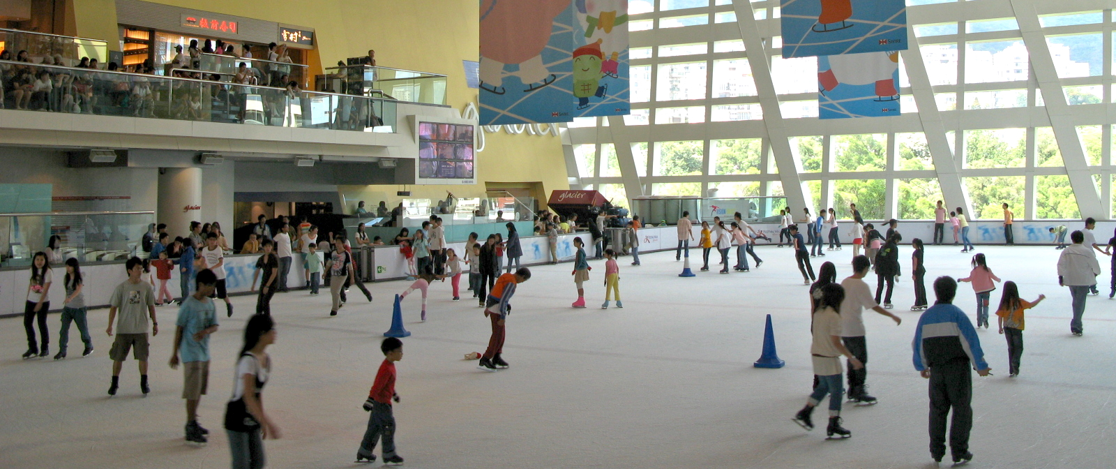 HK Festival Walk Ice skating rink